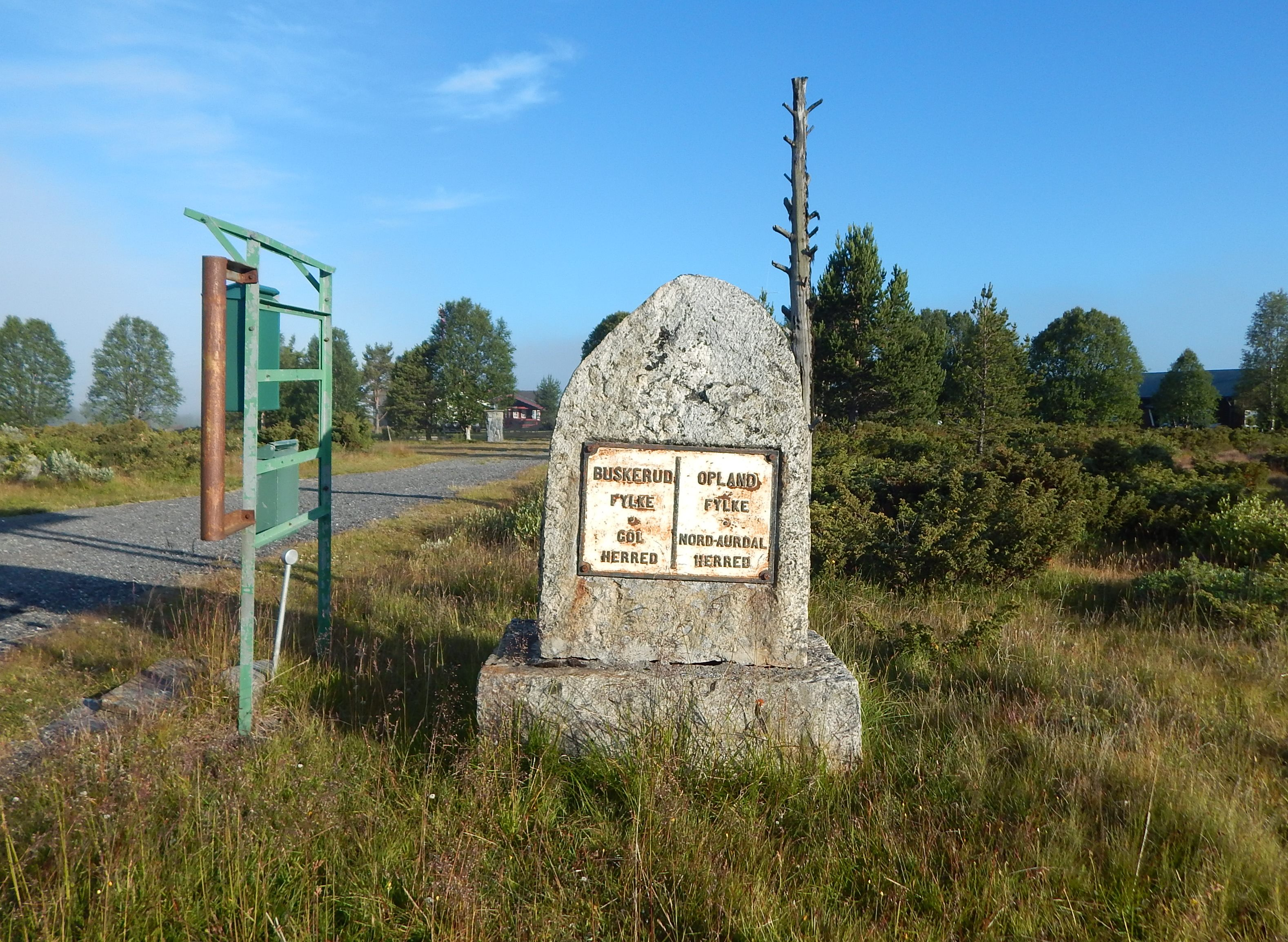 Grensestein langs fylkesvei 51 mellom Nord-Aurdal (Oppland) og Gol (Buskerud)